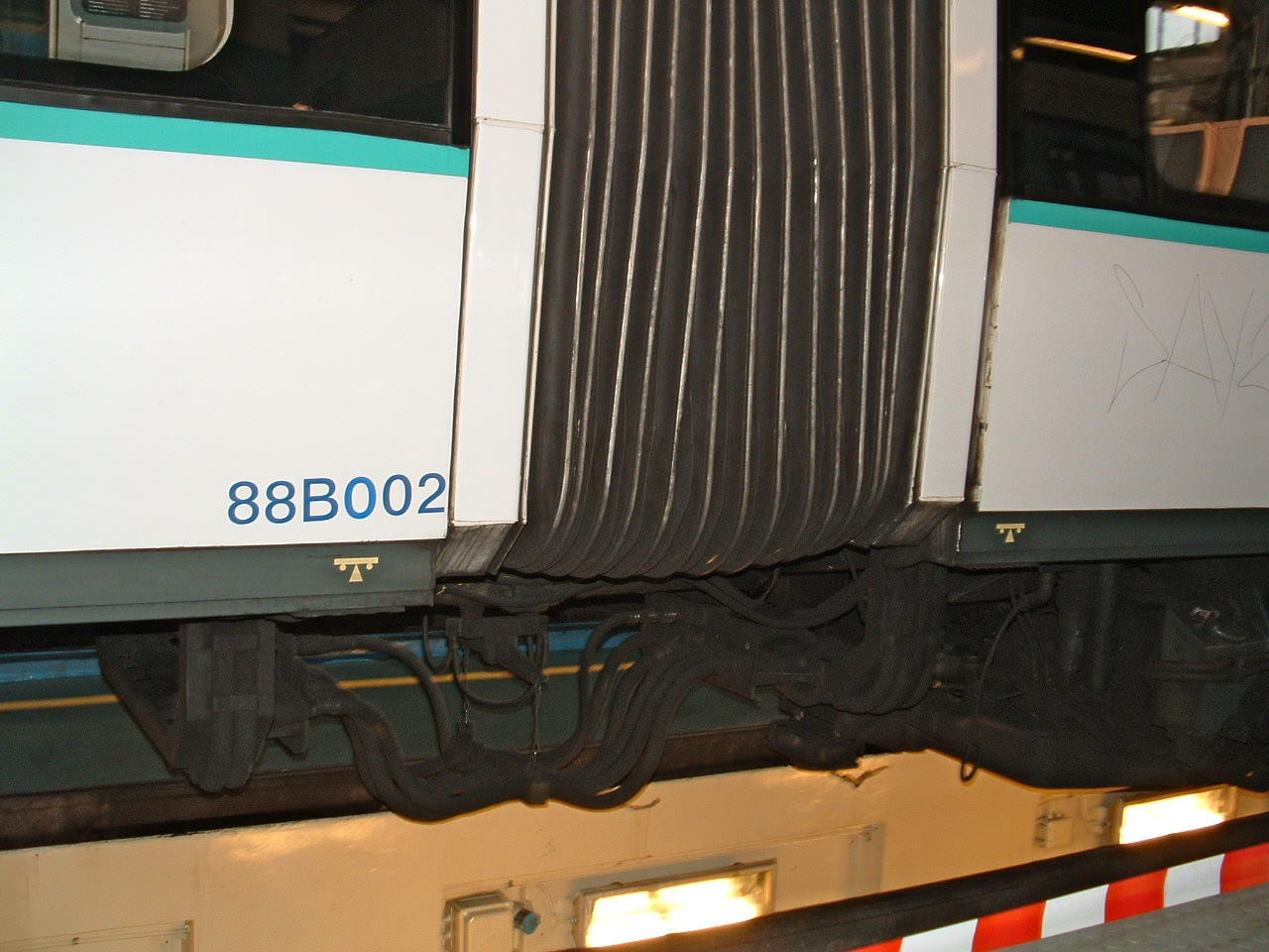 Attelage avec inter circulation d'un train MF 88 aux ateliers de Choisy.